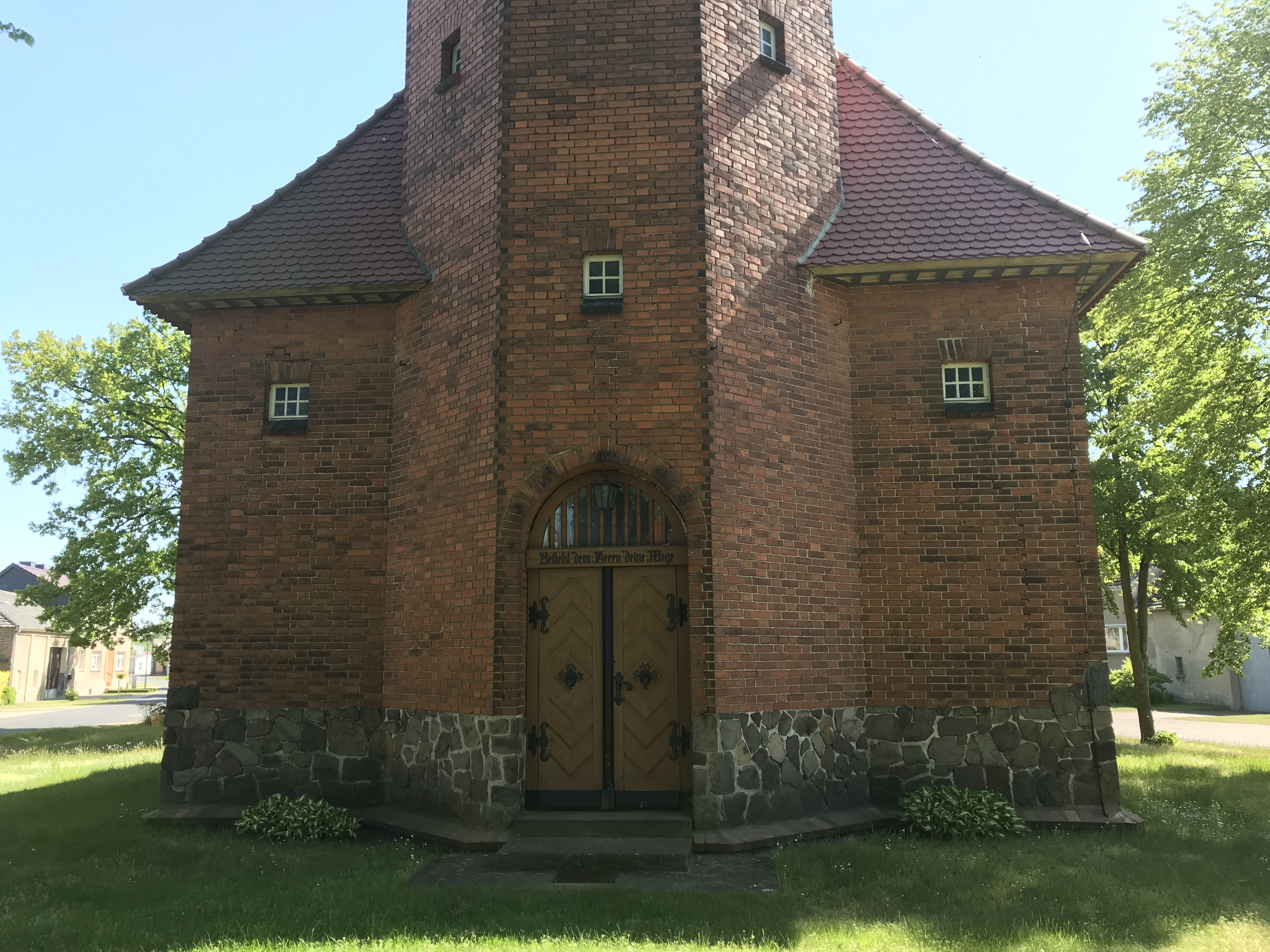 Die Dorfkirche in Schönefeld der Gemeinde Nuthe-Urstromtal entstand in den 1910er Jahren, vermutlich auf einem Vorgängerbau